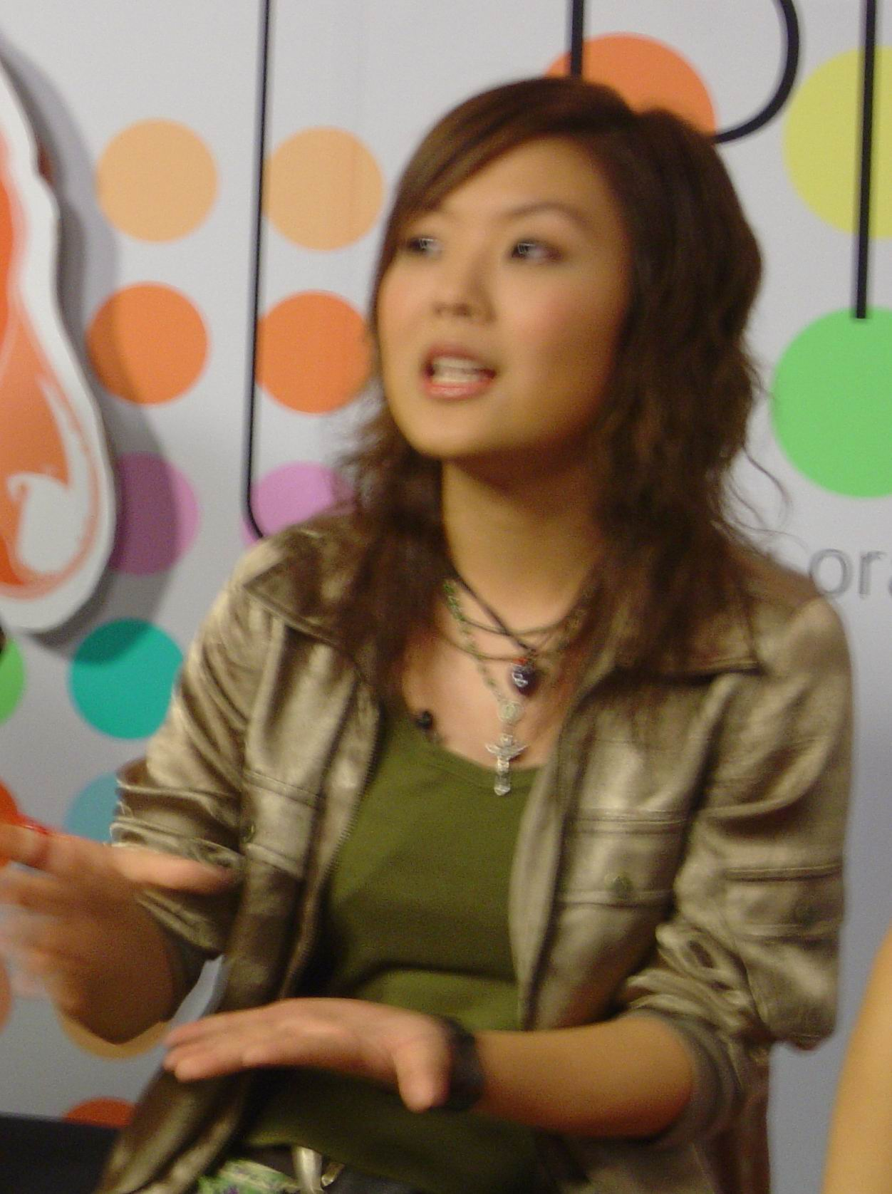 Lula (กันยารัตน์ ติยะพรไชย)